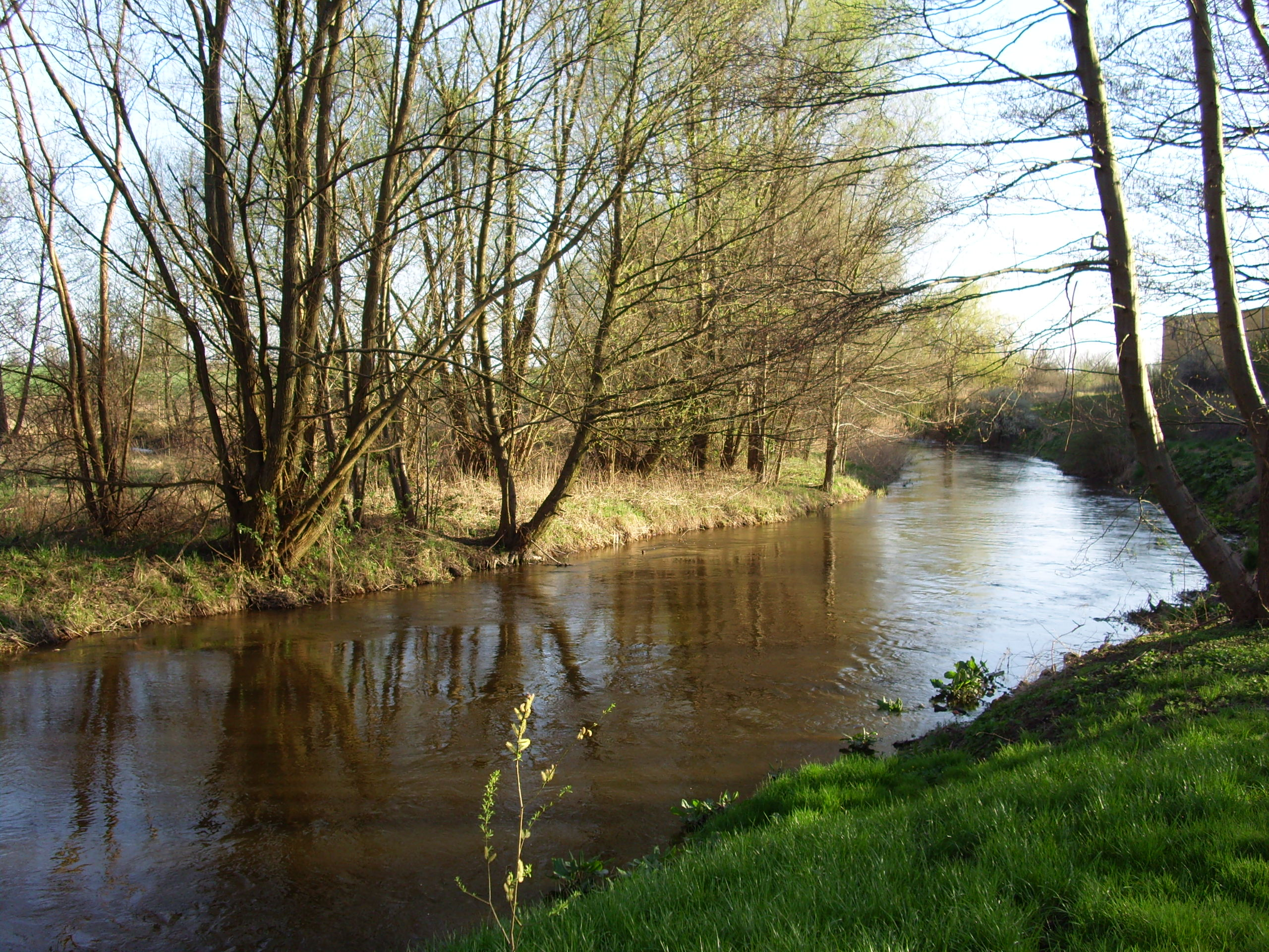 The River Drawa in Drawsko Pomorskie